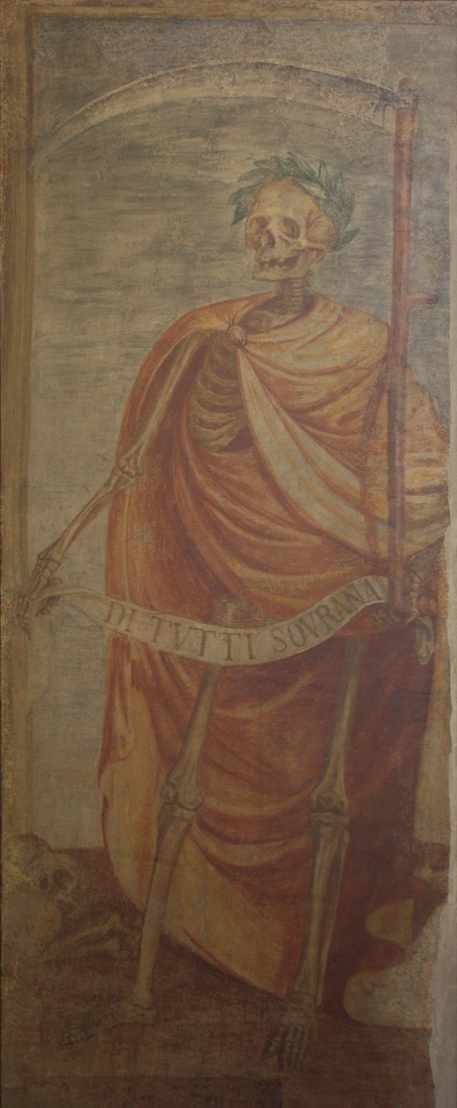 Affresco un tempo posto accanto al mortorio della basilica di San Giovanni Battista di Busto Arsizio e oggi conservato nella chiesa di San Gregorio Magno in Camposanto.